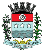 Brasão do município de Balsa Nova (Paraná, Brasil), estabelecido pela LEI Nº 20/78 de 1978.